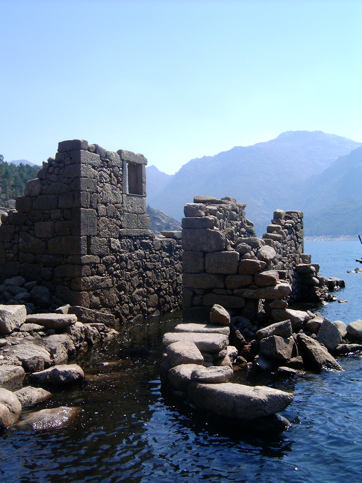 House in "Vilarinho das Furnas" (2005)